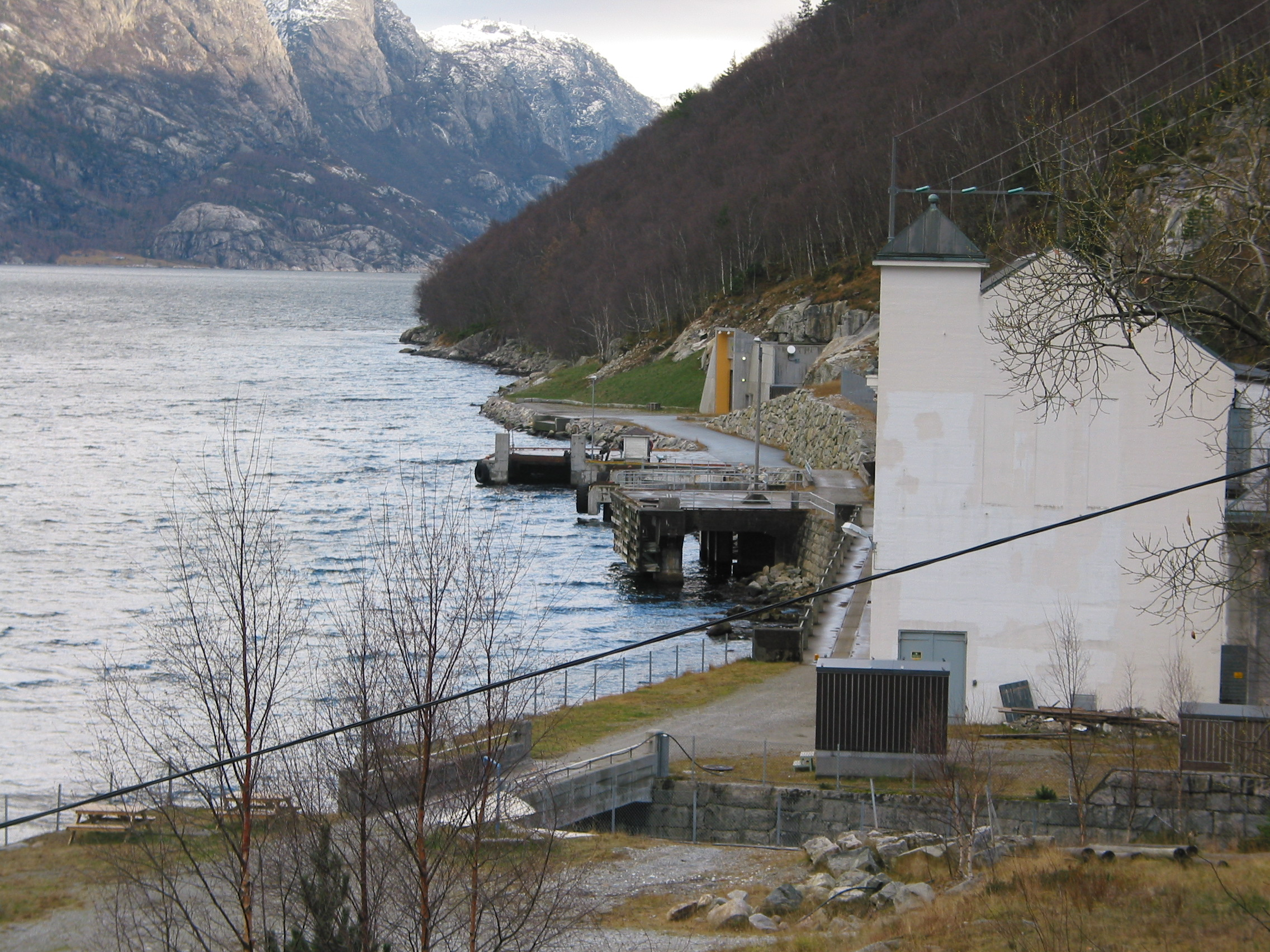 Bilde fra Flørli. Midt i bilde er kaien. Bak/bortforbi ser man den nye Flørli kraftstasjon og det hvite bygget til høyre er gamle Flørli kraftstasjon.